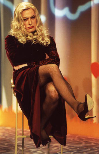 Vulvia - Personaggio di Corrado Guzzanti